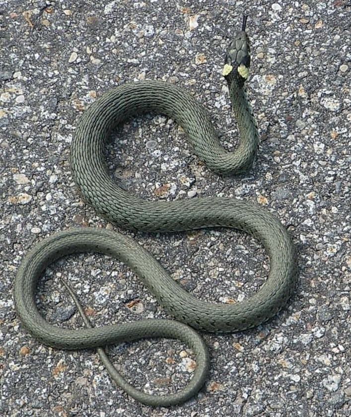 Züngelnde Ringelnatter auf einer Straße in Scheuereck, Bayerischer Wald